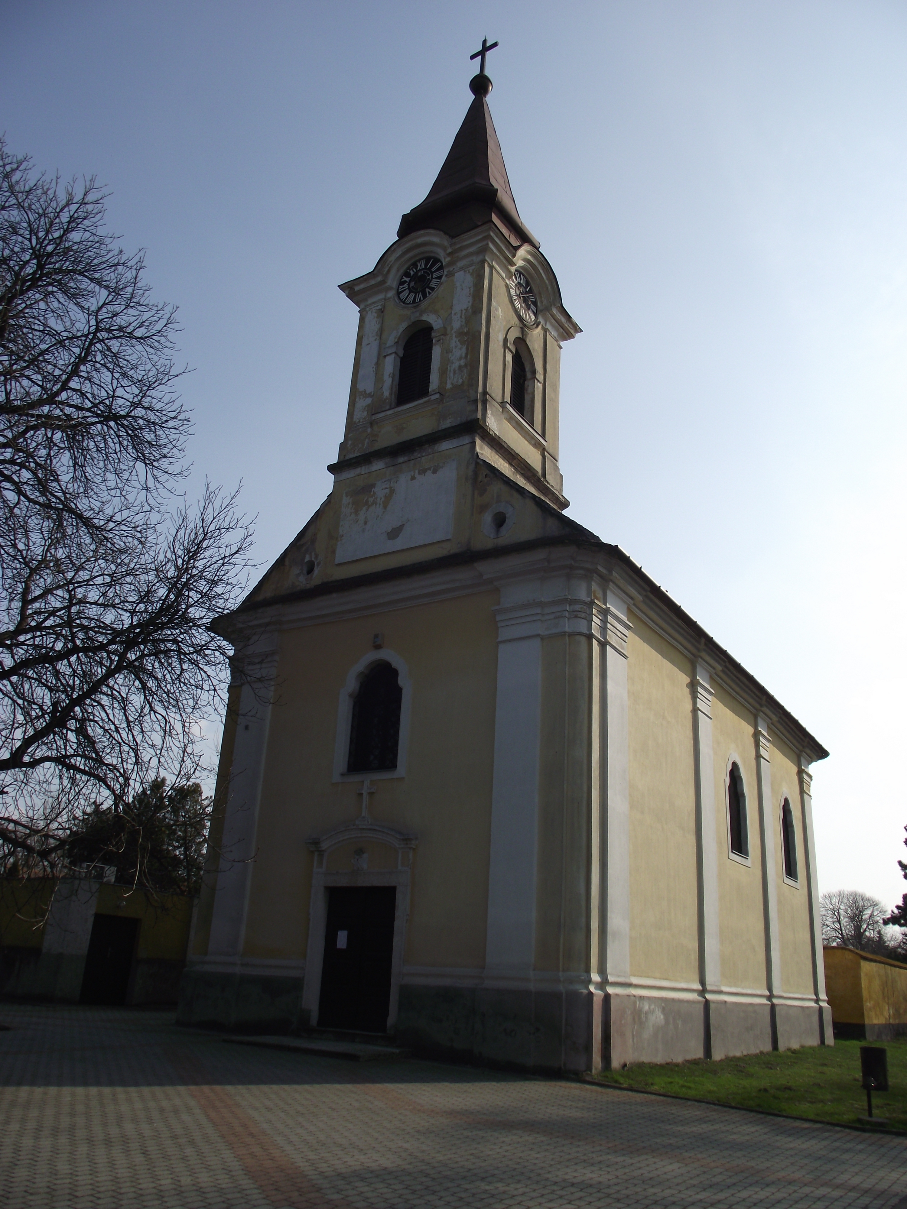 Bábolna - katolikus templom